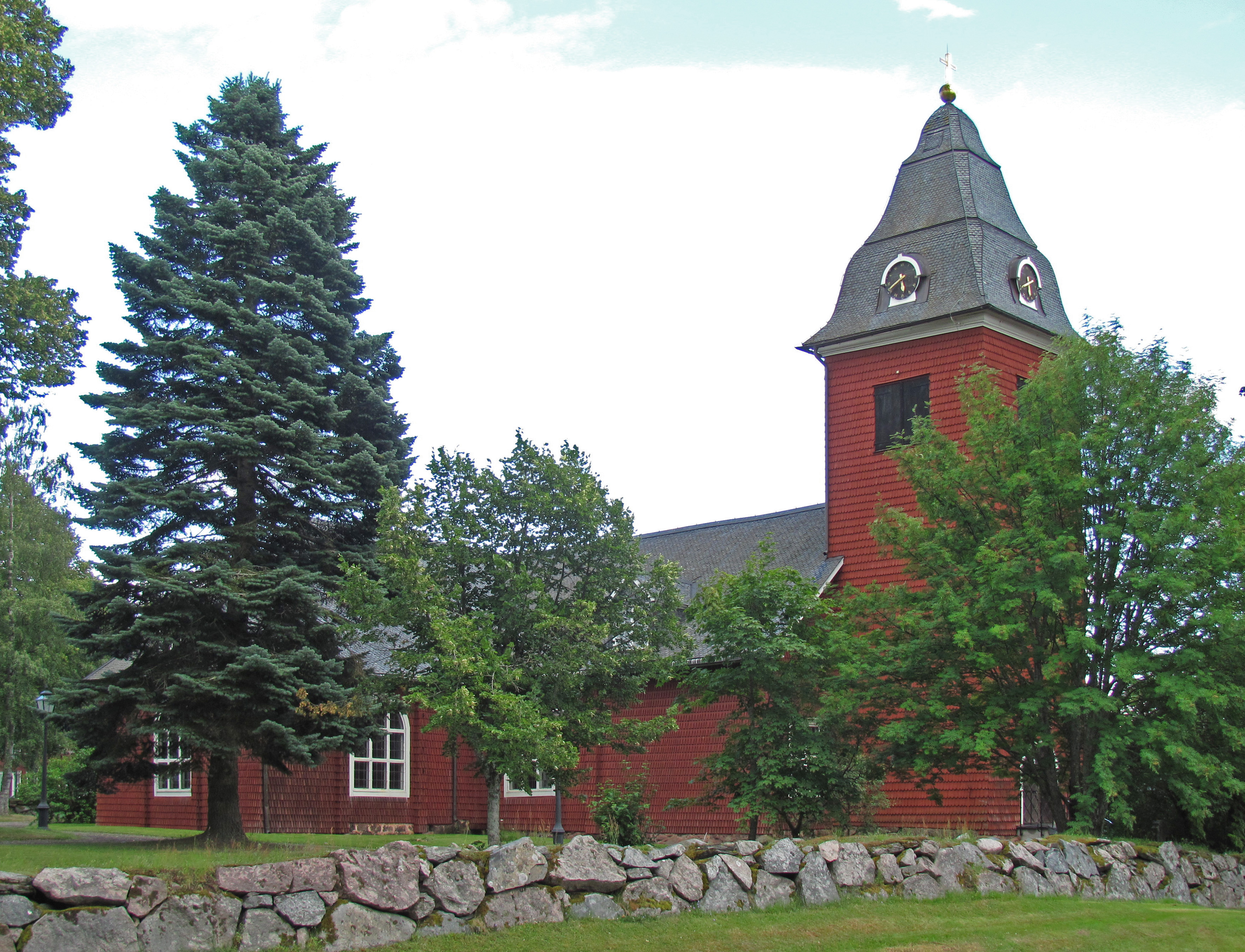 Grythyttans kyrka